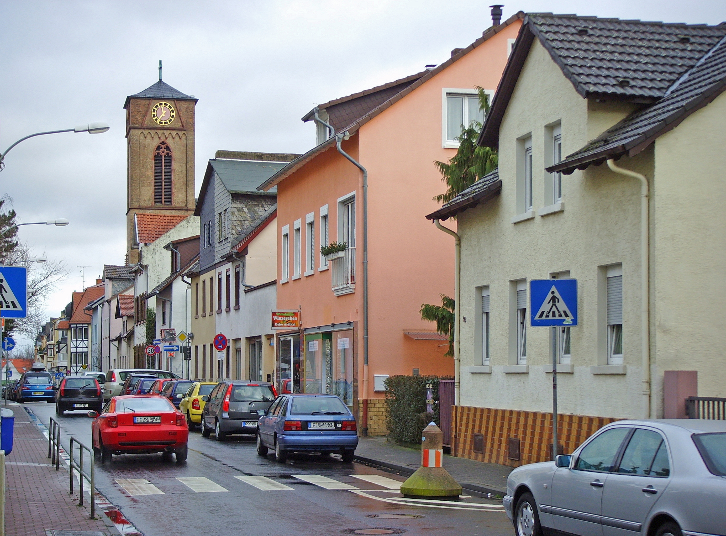 Frankfurt am Main-Heddernheim: Kirchstrasse, Blick nach Osten, im Hintergrund rechts die evangelische St. Thomaskirche mit nach dem Kriege gekapptem Turm.